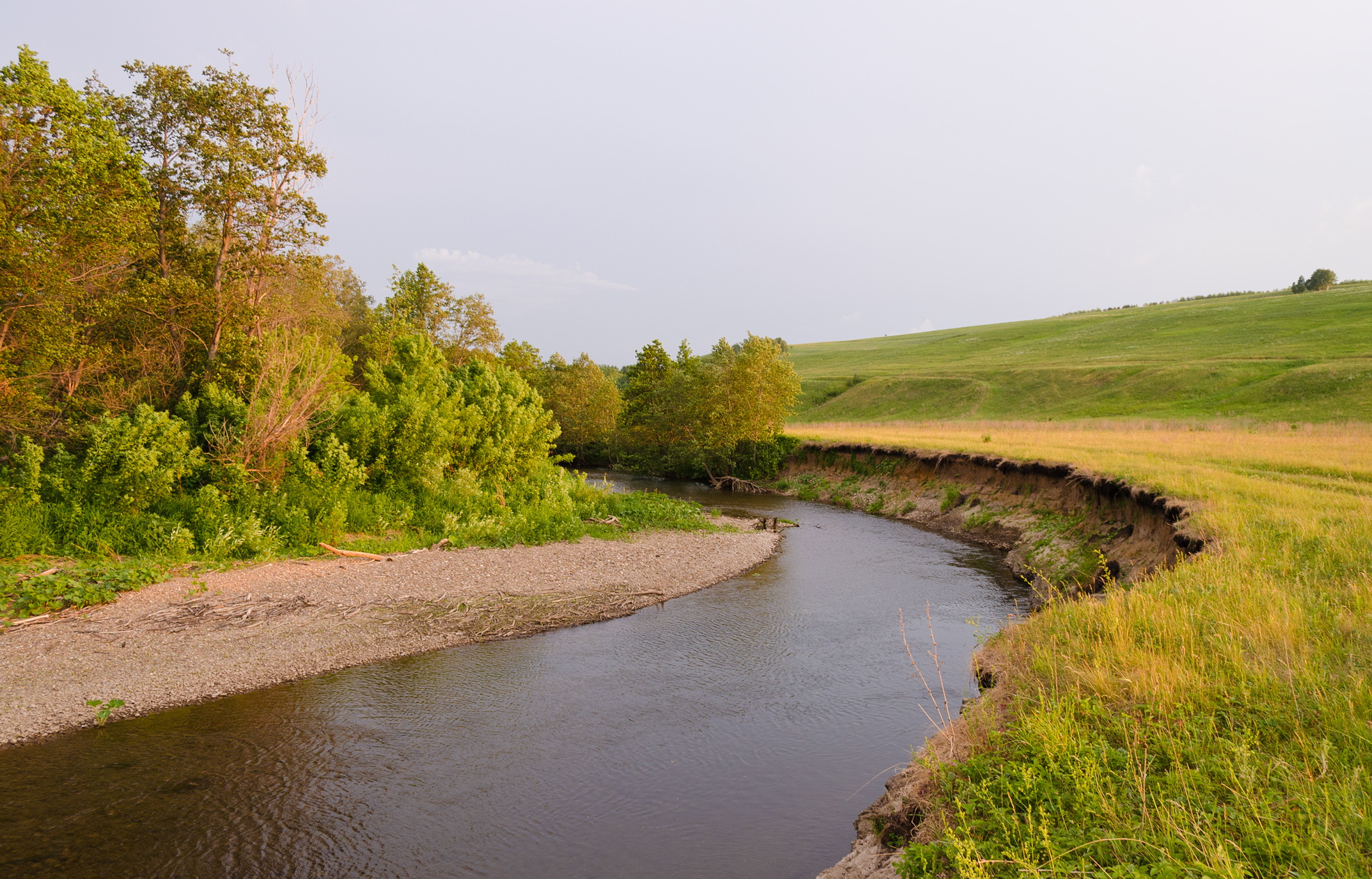 river Zigan, возле селения (Зигановка (Ишимбайский район))